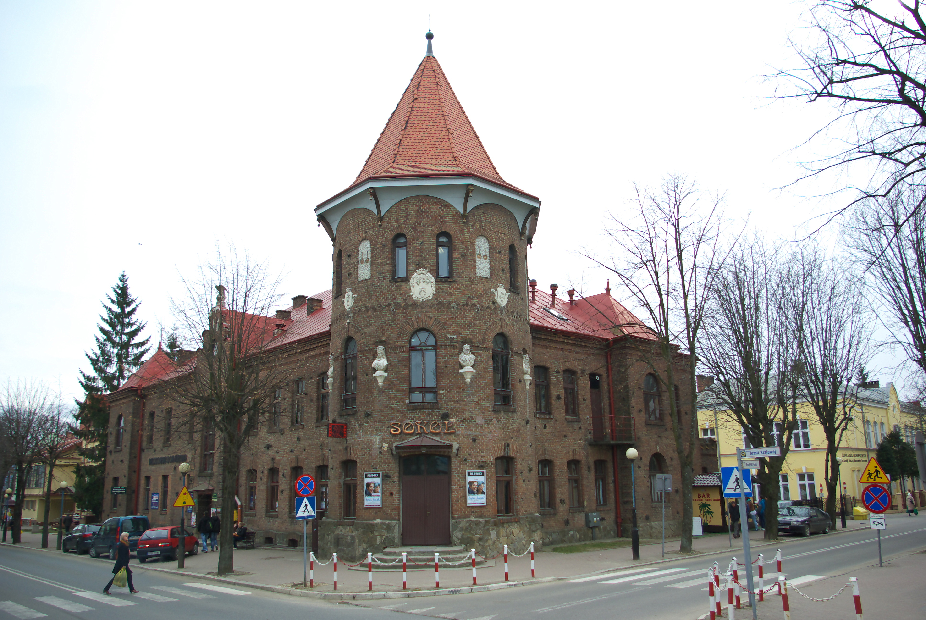 Budynek "Sokoła" w Brzozowie